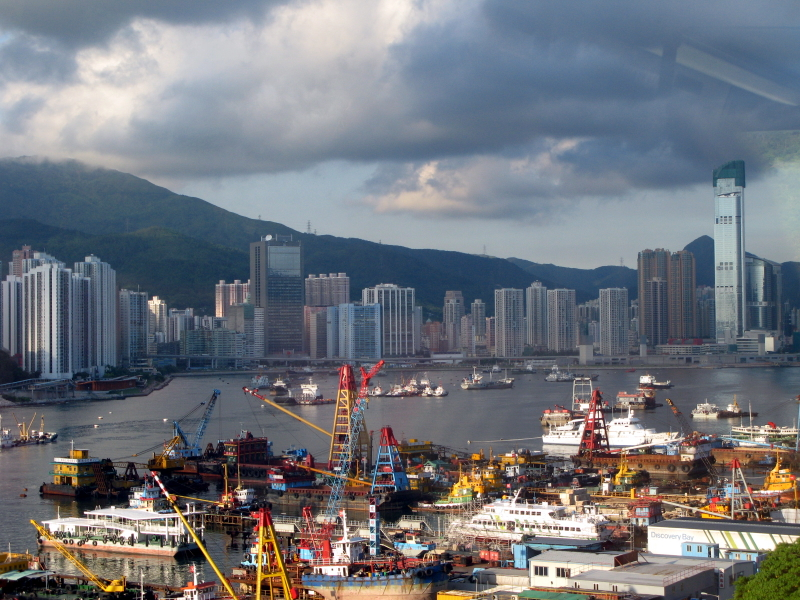 Tsuen Wan